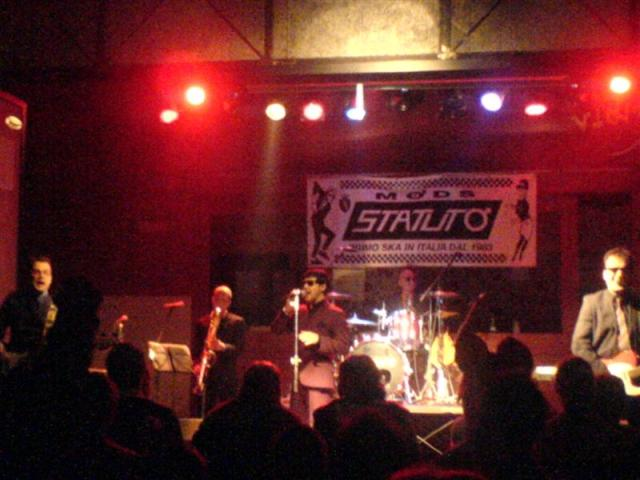 Gli Statuto al Vidia di Cesena